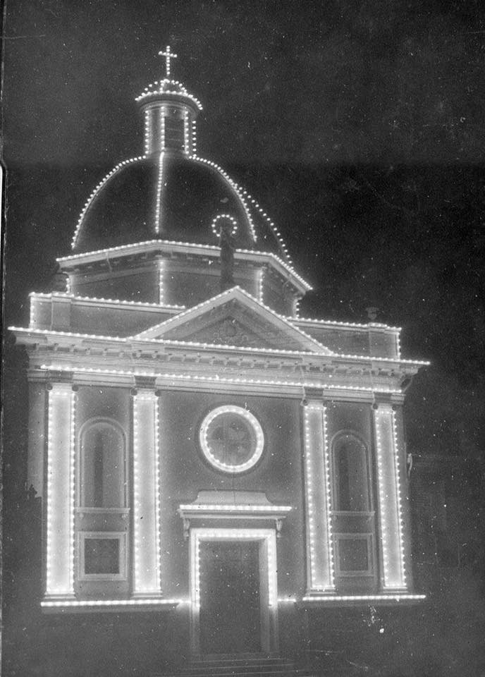 La cappella della Beata Vergine della Porta (Madonnina) di Mirandola illuminata in occasionde del Congresso Liturgico del 1937